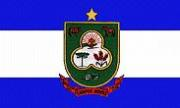 De acordo com o Art.2º da Lei 229 de 1959: O Brasão conterá o símbolo das fontes de produção da Comuna, representado pelo Pinheiro, Trigo, Cavalo, Boi e Agricultura mecanizada, encimado pela Cruz reverenciando Deus, nomenclatura do Município com o nº da Lei Provincial que o criou, o azul representa o céu e as águas e o branco representa a paz. Fonte Site da prefeitura municipal